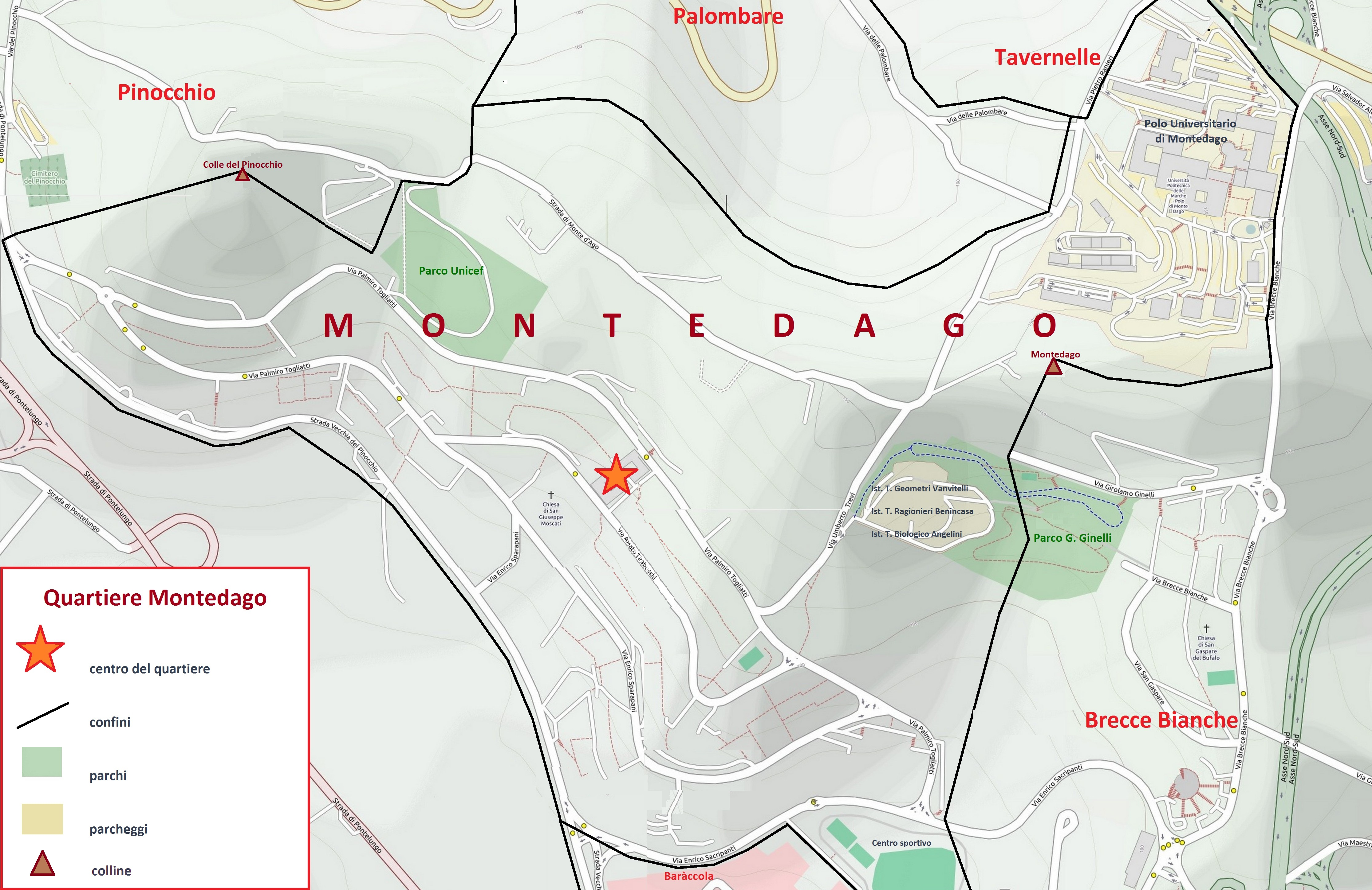 Mappa del quartiere Montedago (o Monte d'Ago, Monte Dago) di Ancona, con i confini, le vie, le piazze e i parchi.